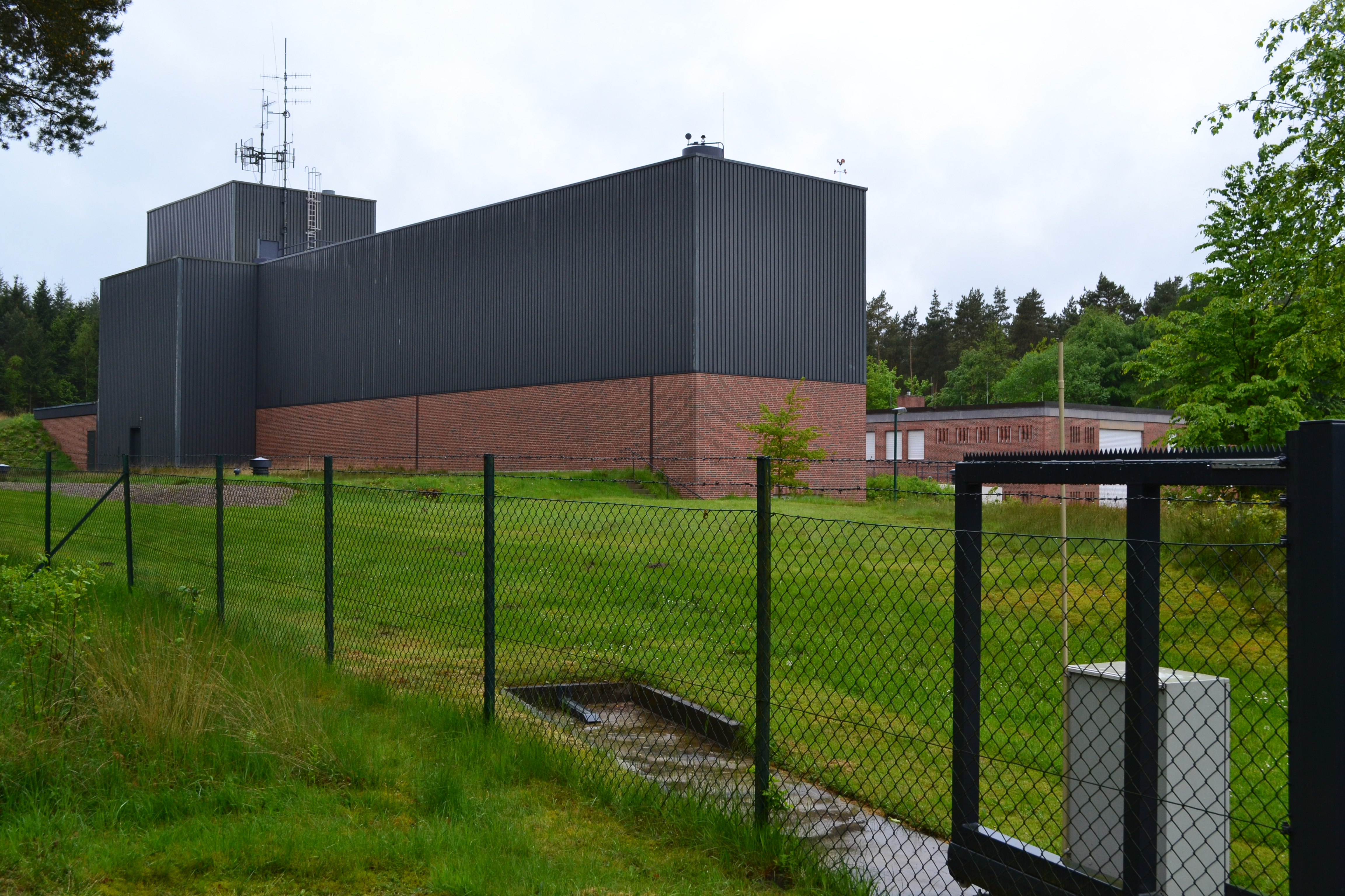 Wasserwerk Nordheide von Hamburg Wasser zwischen Garlstorf und Nindorf.